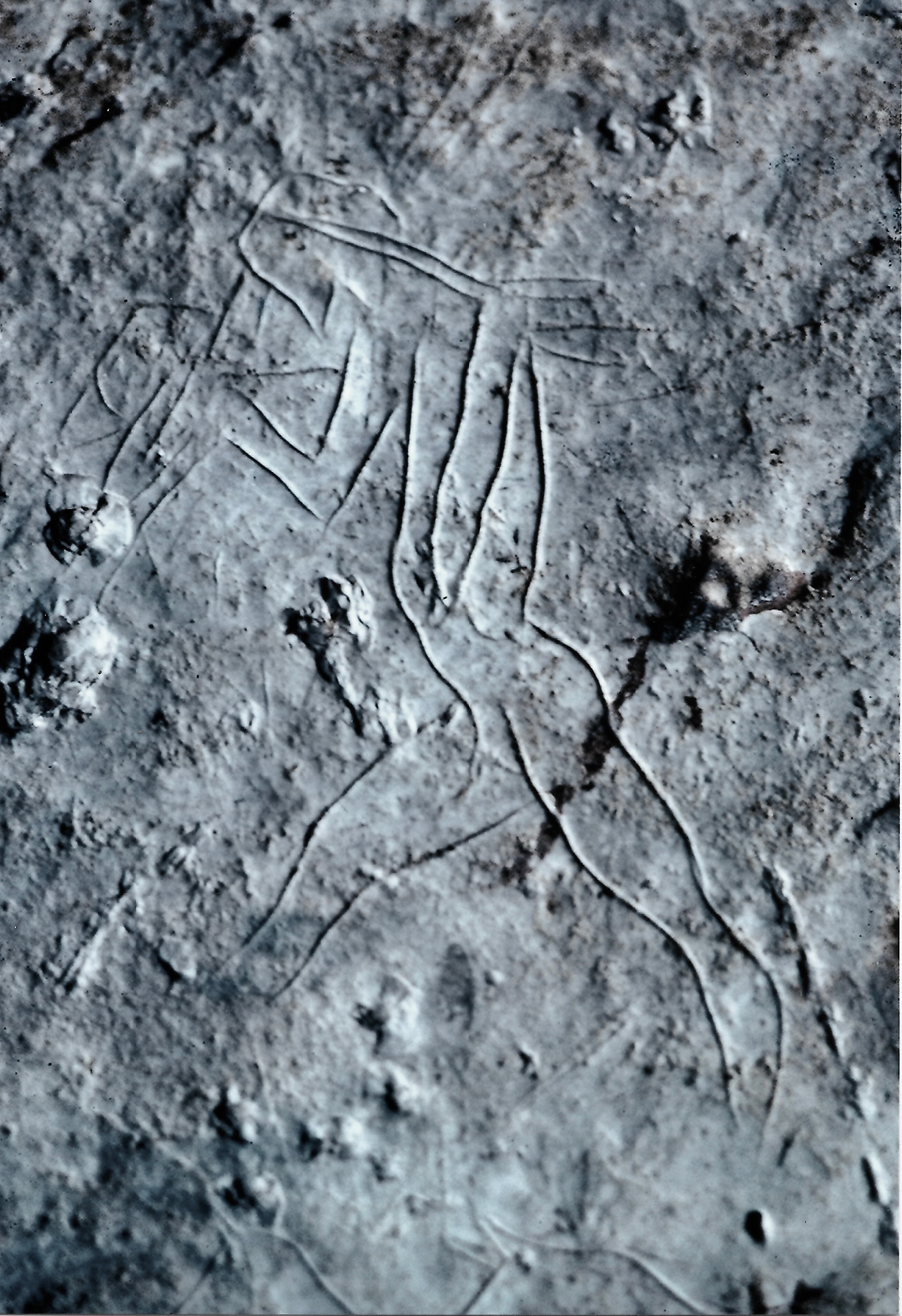 figura chiave per la corretta interpretazione dei graffiti della grotta dell’Addaura: il personaggio in cammino trasporta per mezzo di corde che gli traversano la fronte un individuo che non può che essere morto.